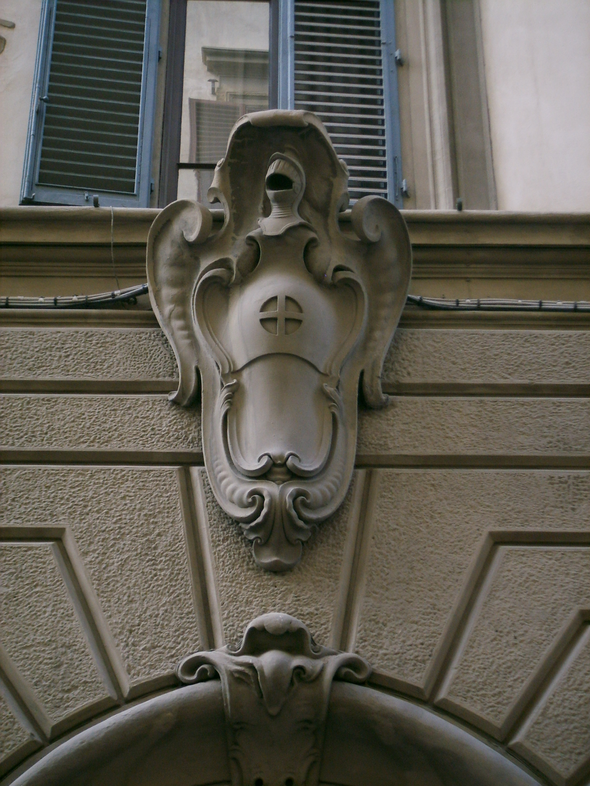 Palazzo panciatichi, stemmaretro